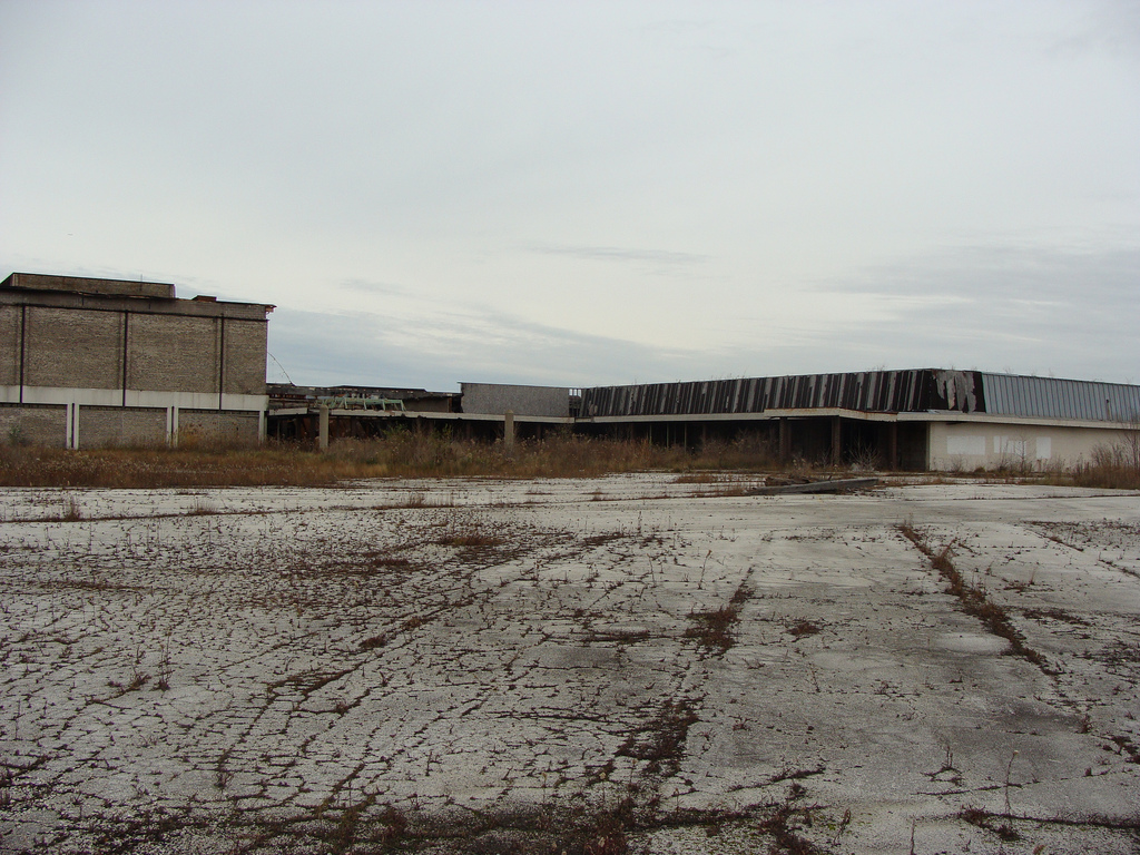 Movie Location (Dixie Square Mall)